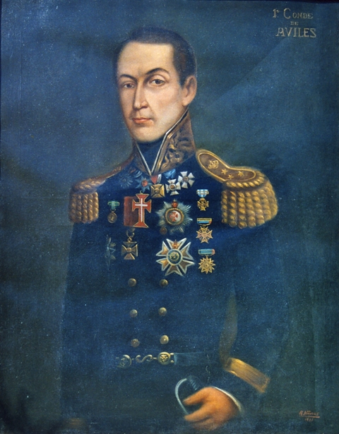 Retrato do general português Jorge Avilez, 1° conde de Avilez.